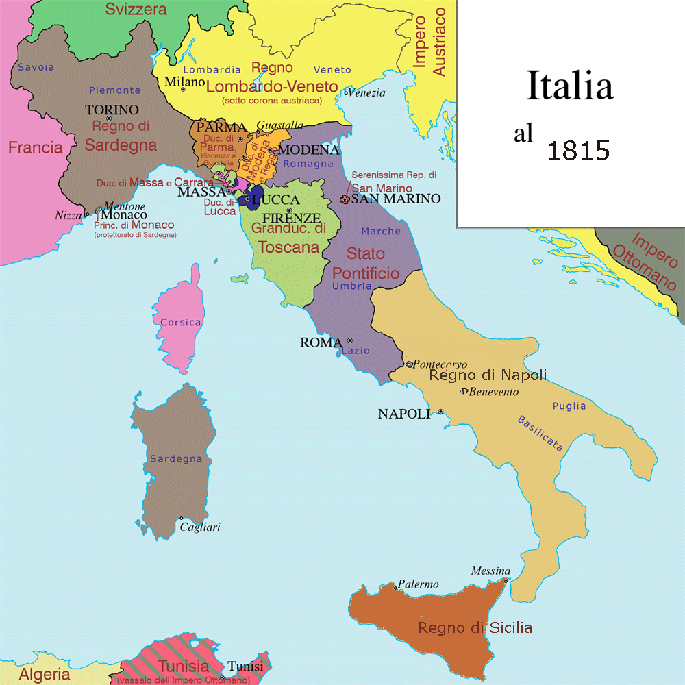 Mappa degli stati preunitari italiano dopo il Congresso di Bienne (1815)